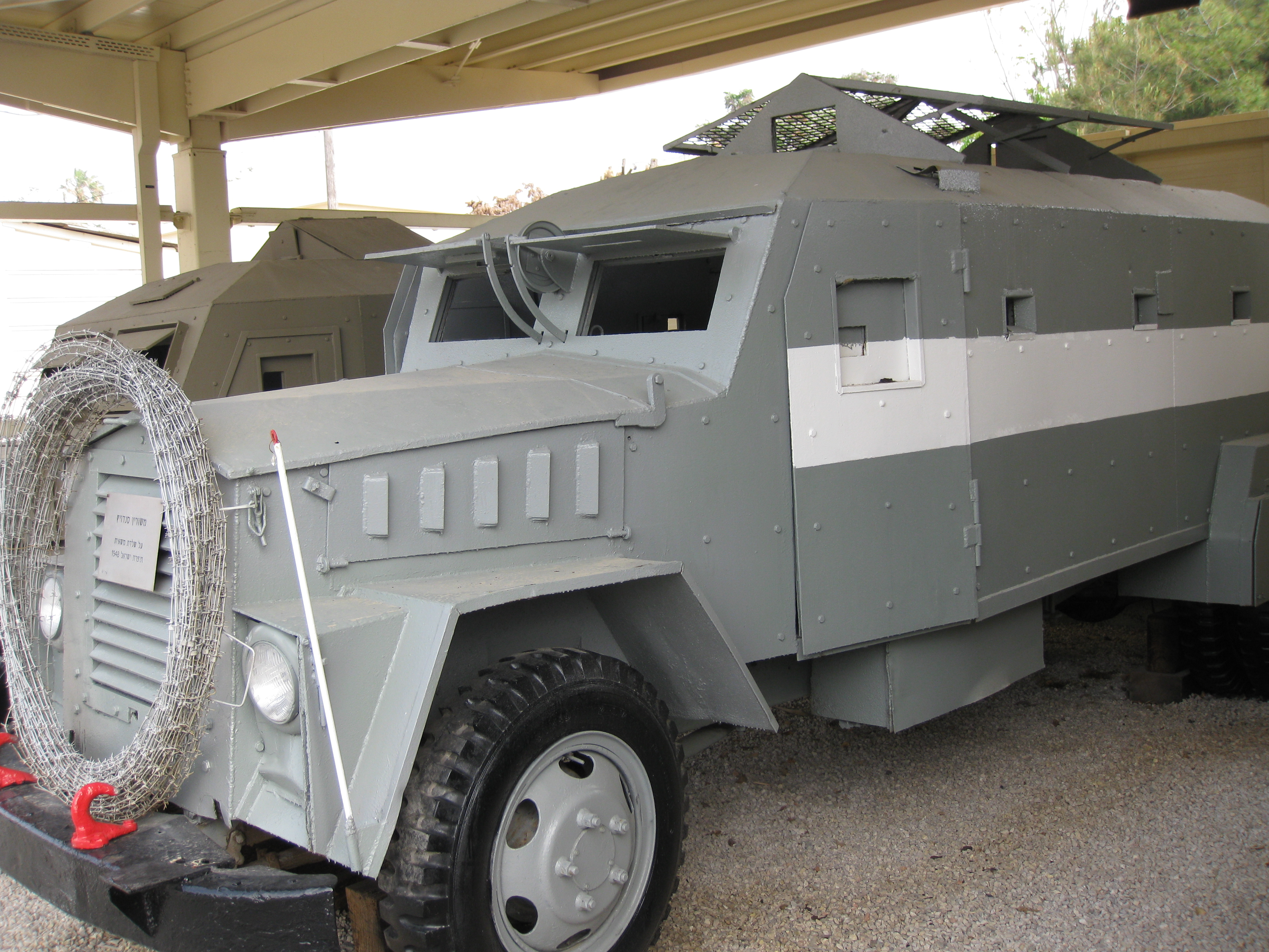 Batey ha-Osef Museum - Armoured vehicles מוזיאון בתי האוסף - משורייני תש"ח